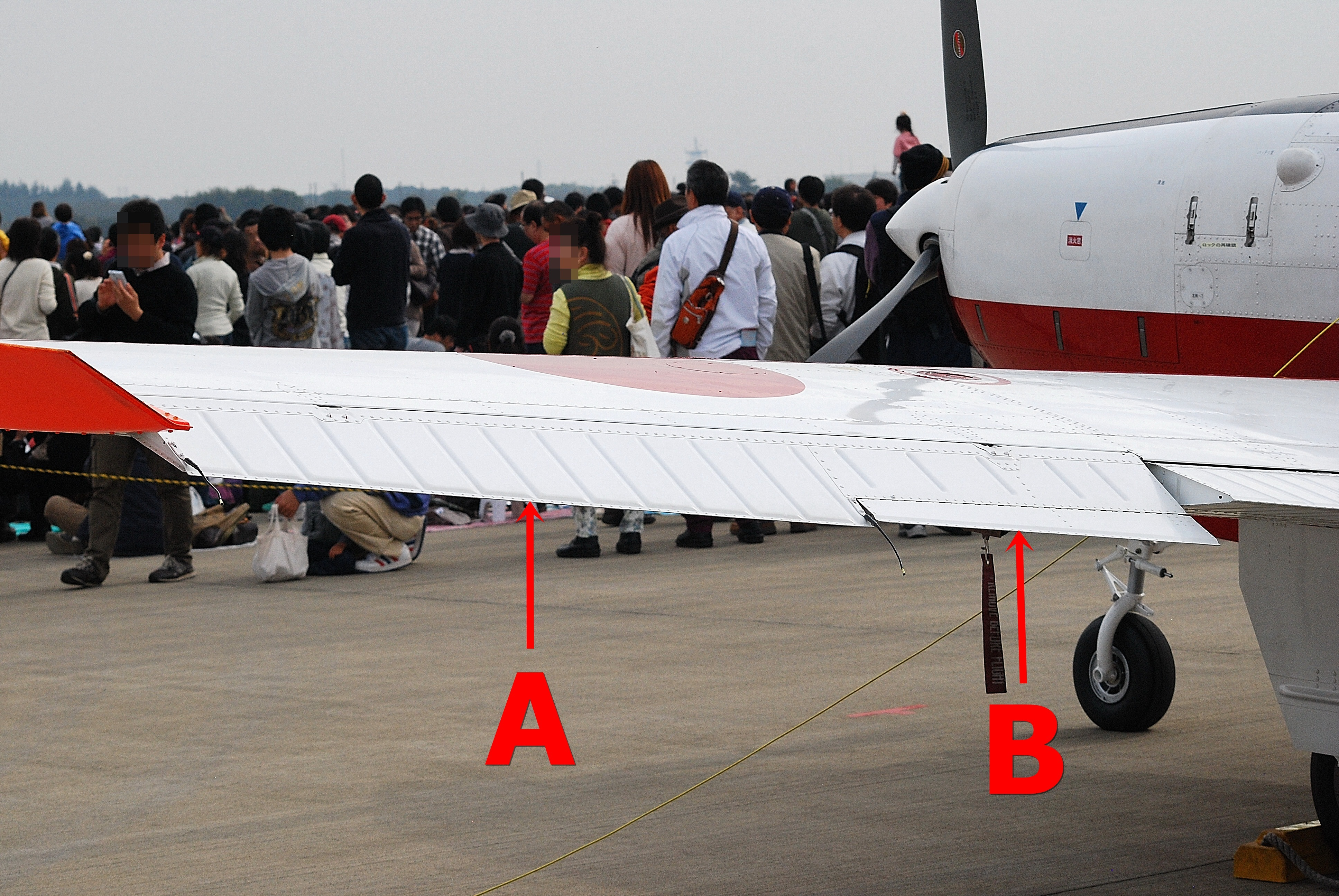 航空自衛隊T-7初等練習機のエルロン（補助翼）。A補助翼、Bトリム・タブ。（2013年の入間基地航空祭にて撮影）